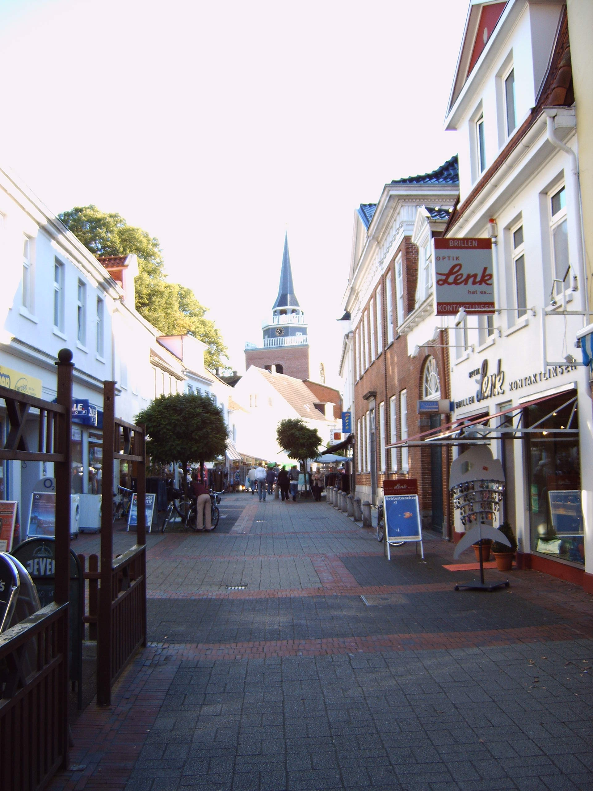 Fussgängerzone in Aurich, im Hintergrund der Lambertiturm, Bild aufgenommen von Olaf Meister am 4. Oktober 2005